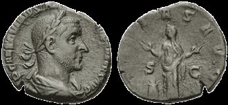 Сестерцій, 251-253 рр., аурихалк (13,32 г.). Аверс - Траян Децій, IMP CAES C VIBIVS TREBONIANVS GALLVS AVG, реверс – Піетас (втілення благочестя), PIETAS AVGG / S-C.